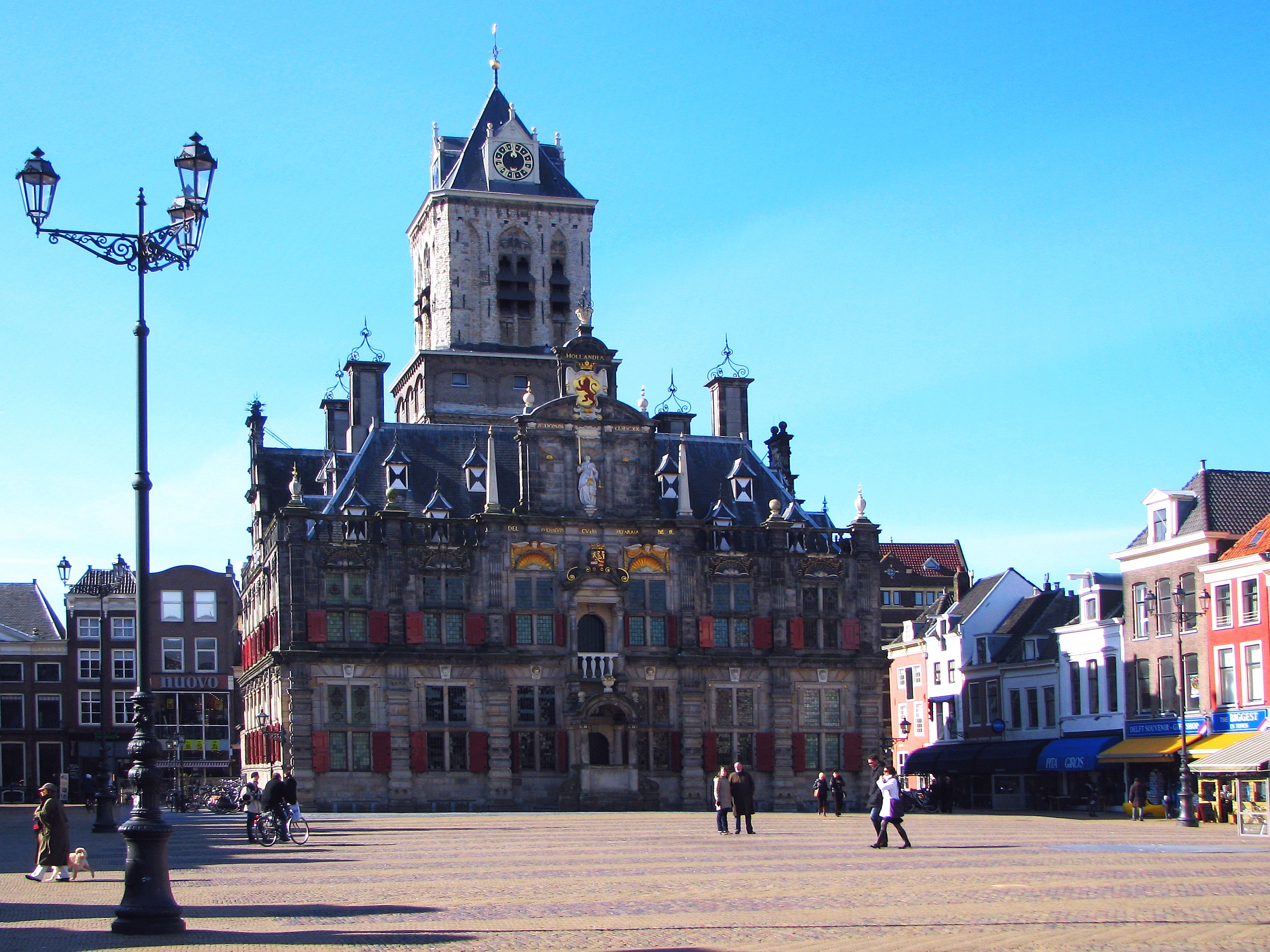 Rathaus von 1620 in der Stadt Delft Prov. Zuidholland Niederlande - Foto Wolfgang Pehlemann IMG_2348.jpg